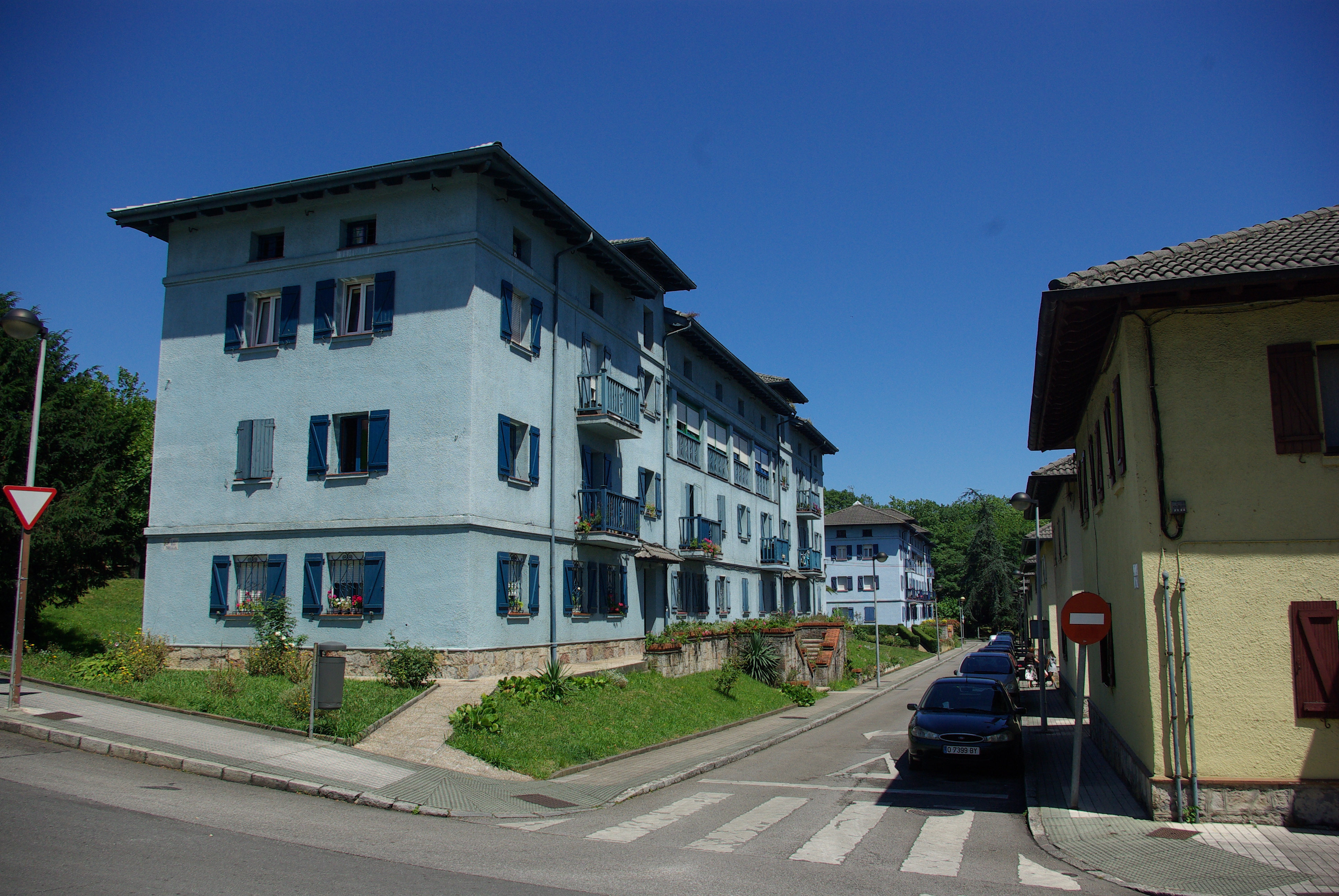 Vivienda